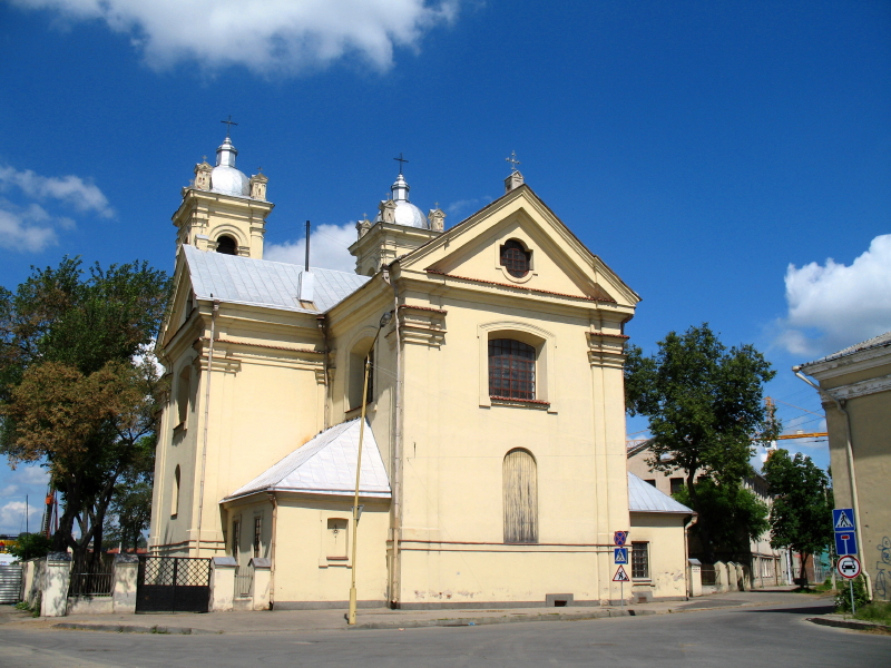 Šv. Kryžiaus (Karmelitų) bažnyčia, Kaunas.